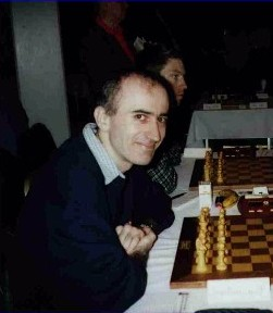 Jon Levitt